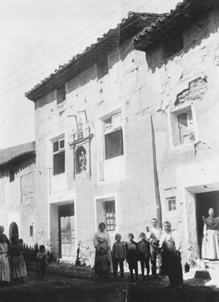 Casa natale di Miguel de Molinos (1628-1696) a Muniesa, Spagna